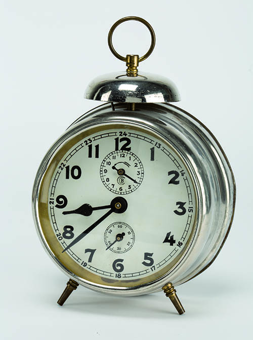 Babywecker, Badische Uhrenfabrik, Furtwangen, um 1925, Deutsches Uhrenmuseum, Inv. 2011-64